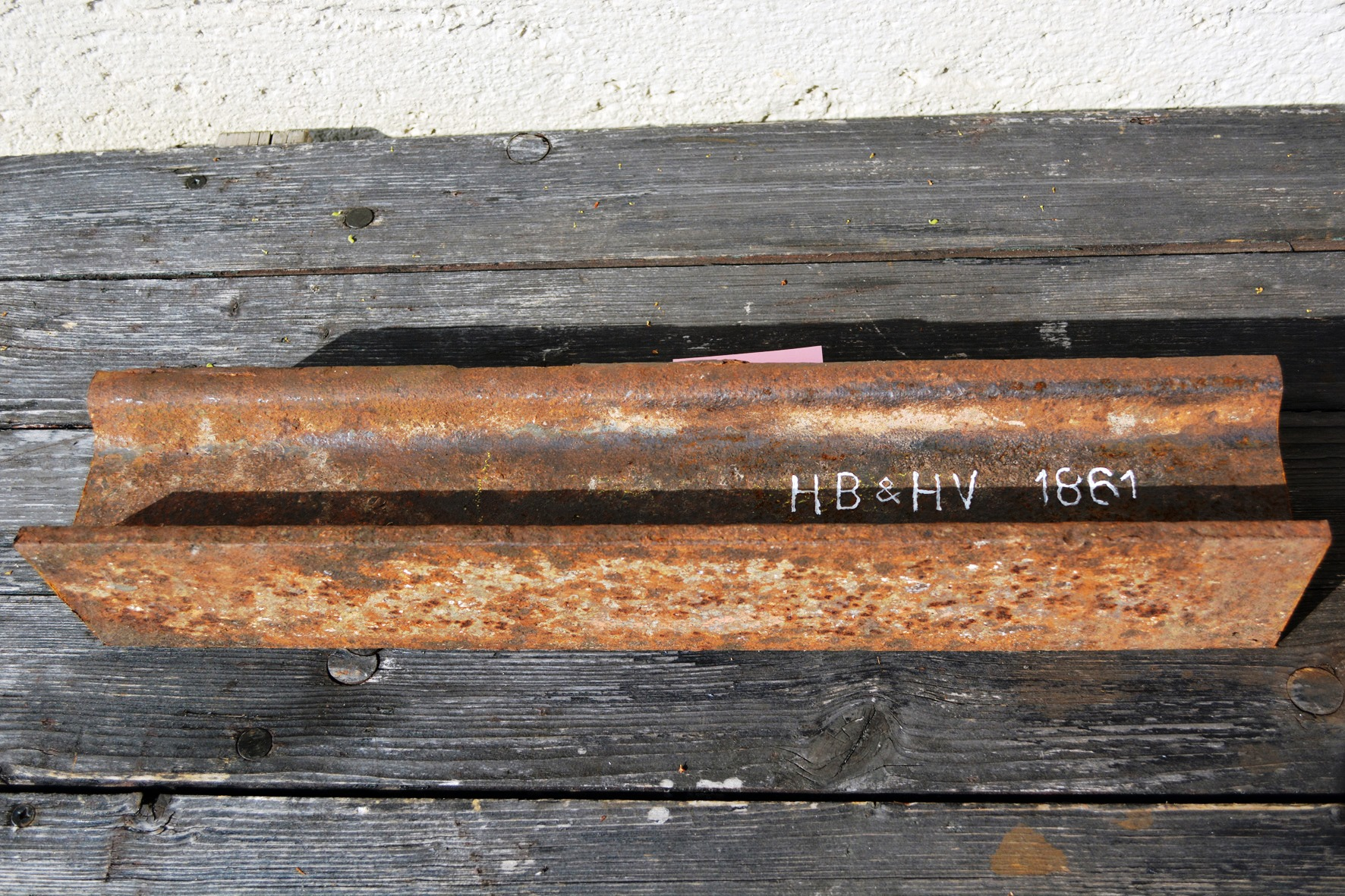 Im Bayerischen Eisenbahnmuseum in Nördlingen. seit 1852 Hörder Bergwerks- u. Hüttenverein, Piepenstock-Hermannshütte, ab 1907 Phönix A.G. für Bergbau und Hüttenbetrieb- Abt Hörder Verein, Hörde i.W.,1852 Puddeleisen, erst ab 1862 / 63 Bessemerstahl,1879 erste Thomasstahl-Charge erblasen.